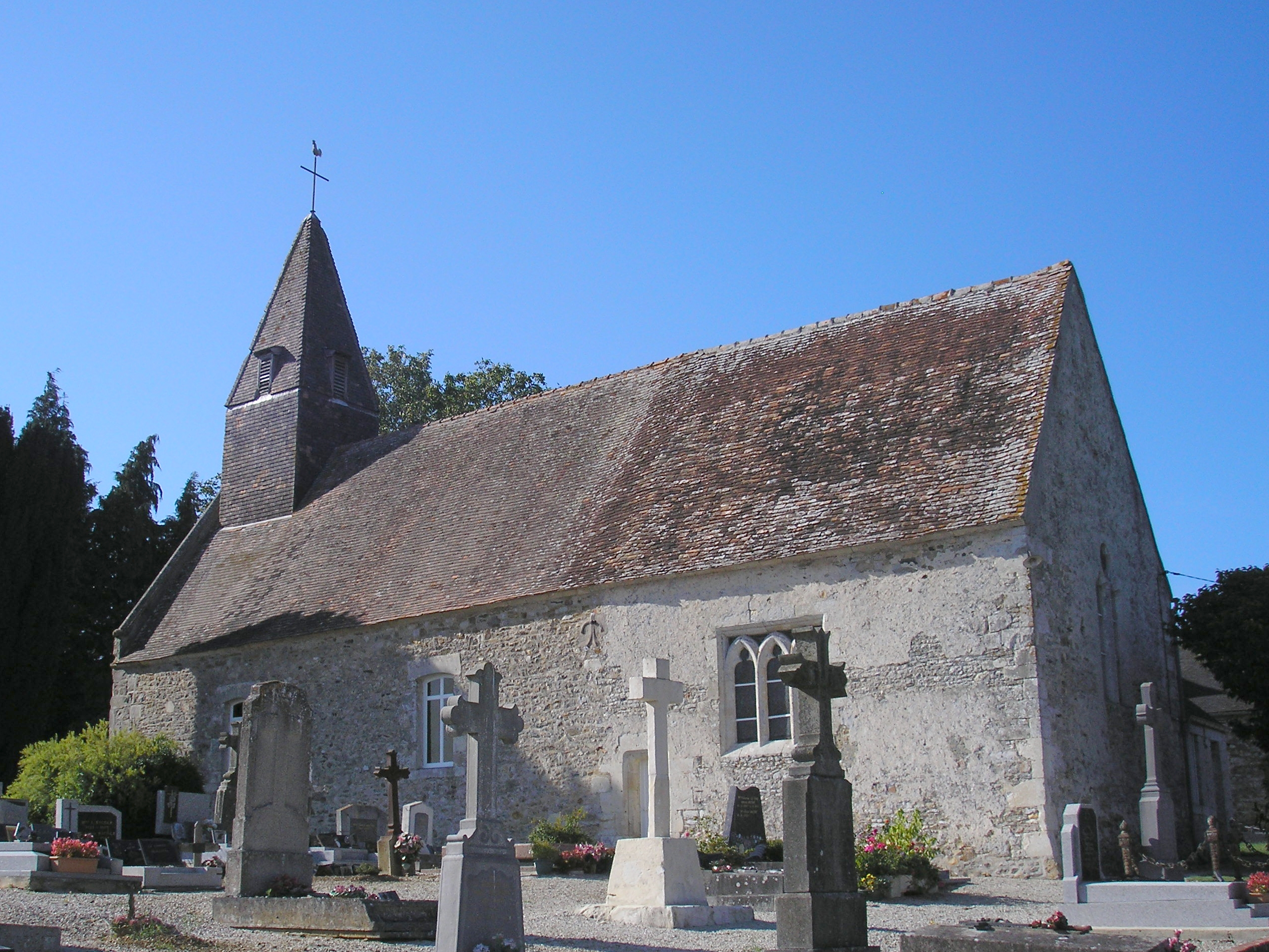 Pierrepont (Normandie, France). L'église Saint-Julien.